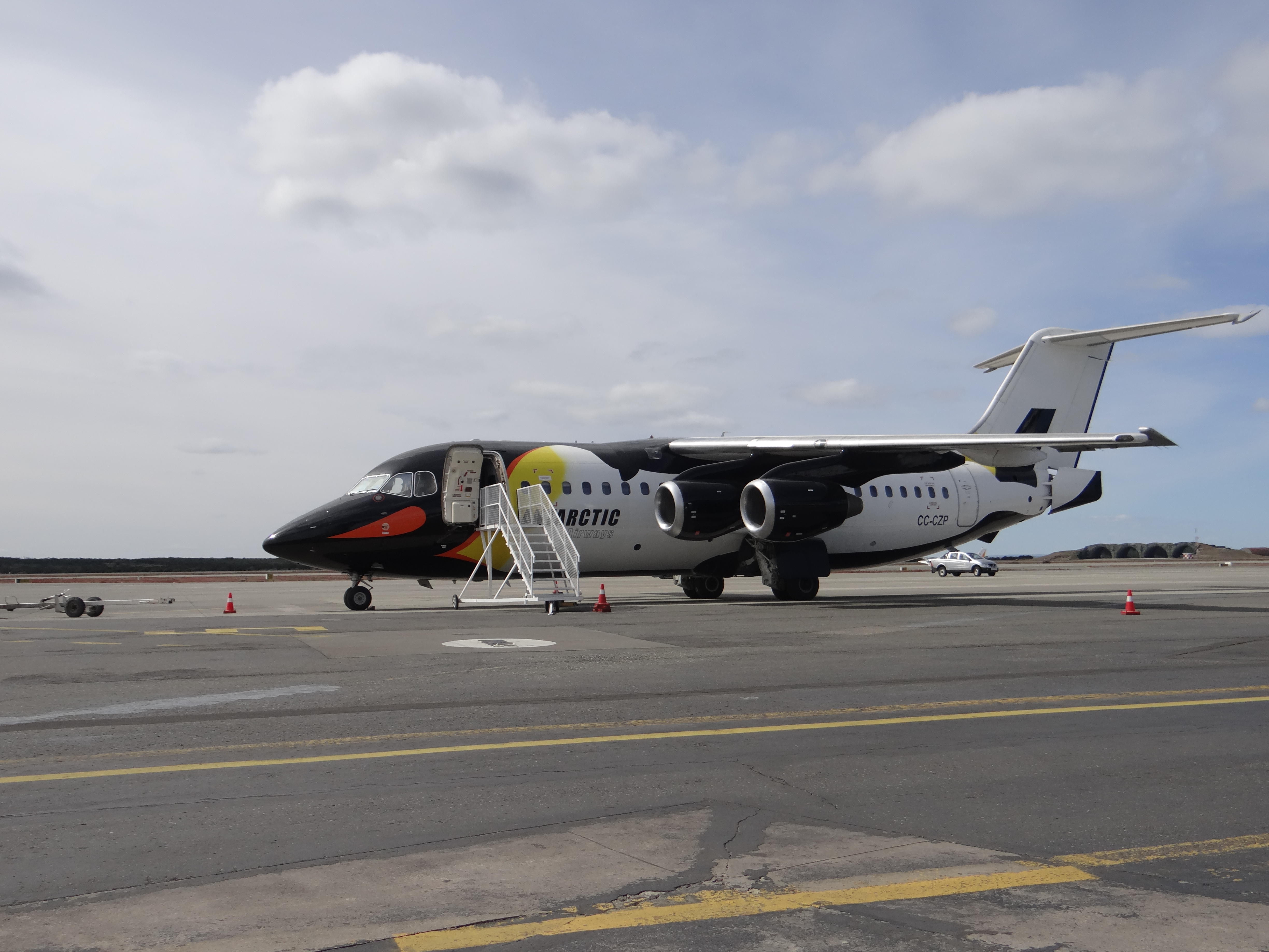 El primero de la flota BAe de DAP Antarctic Airways en ser pintado como pingüino rey. Foto: Tania Pivcevic, Diciembre 2016.